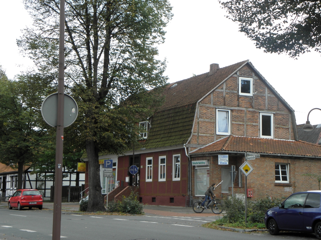 Ebstorf 2011